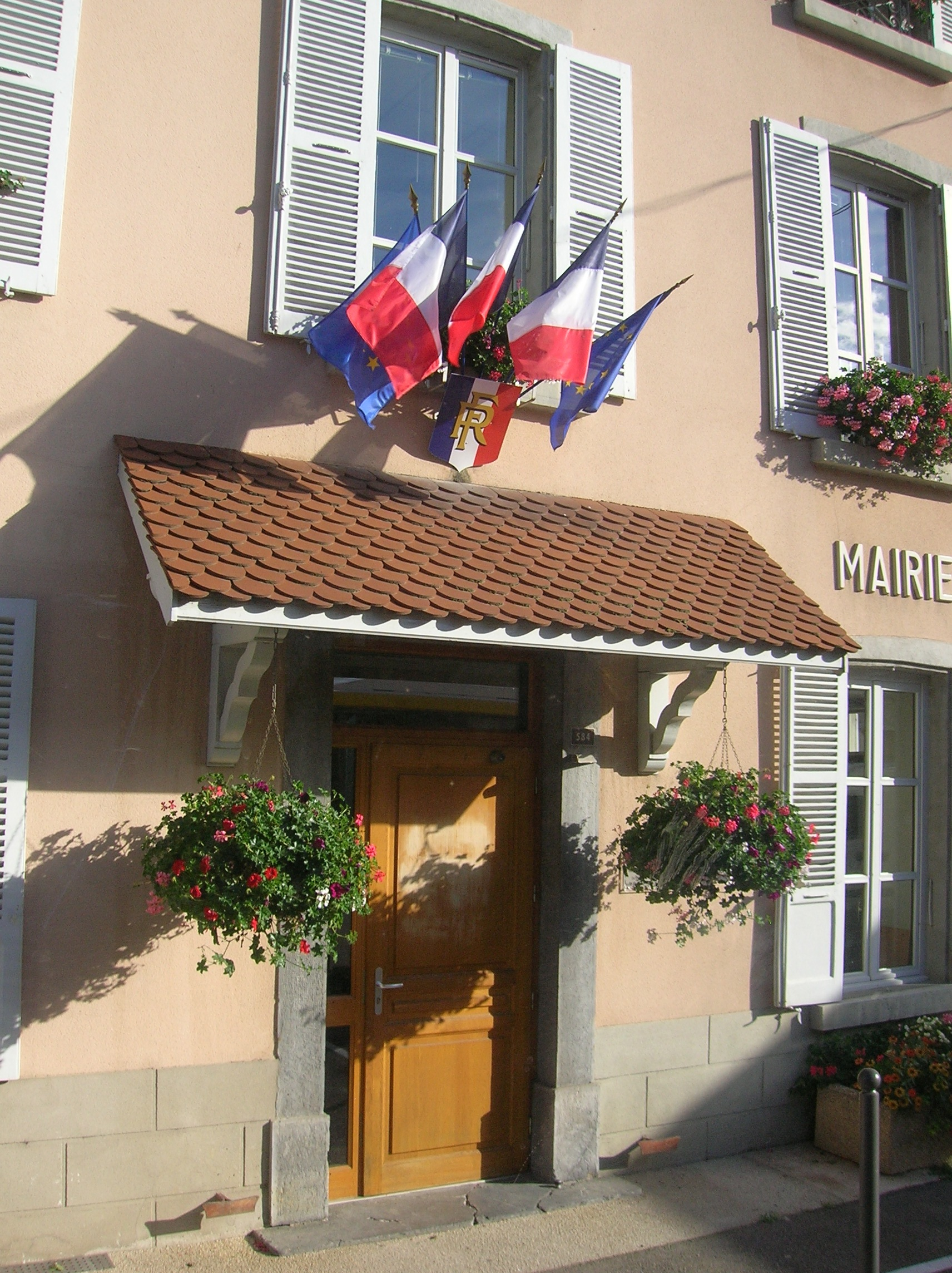 mairie. Vaulnaveys-le-Haut, Isère, France.